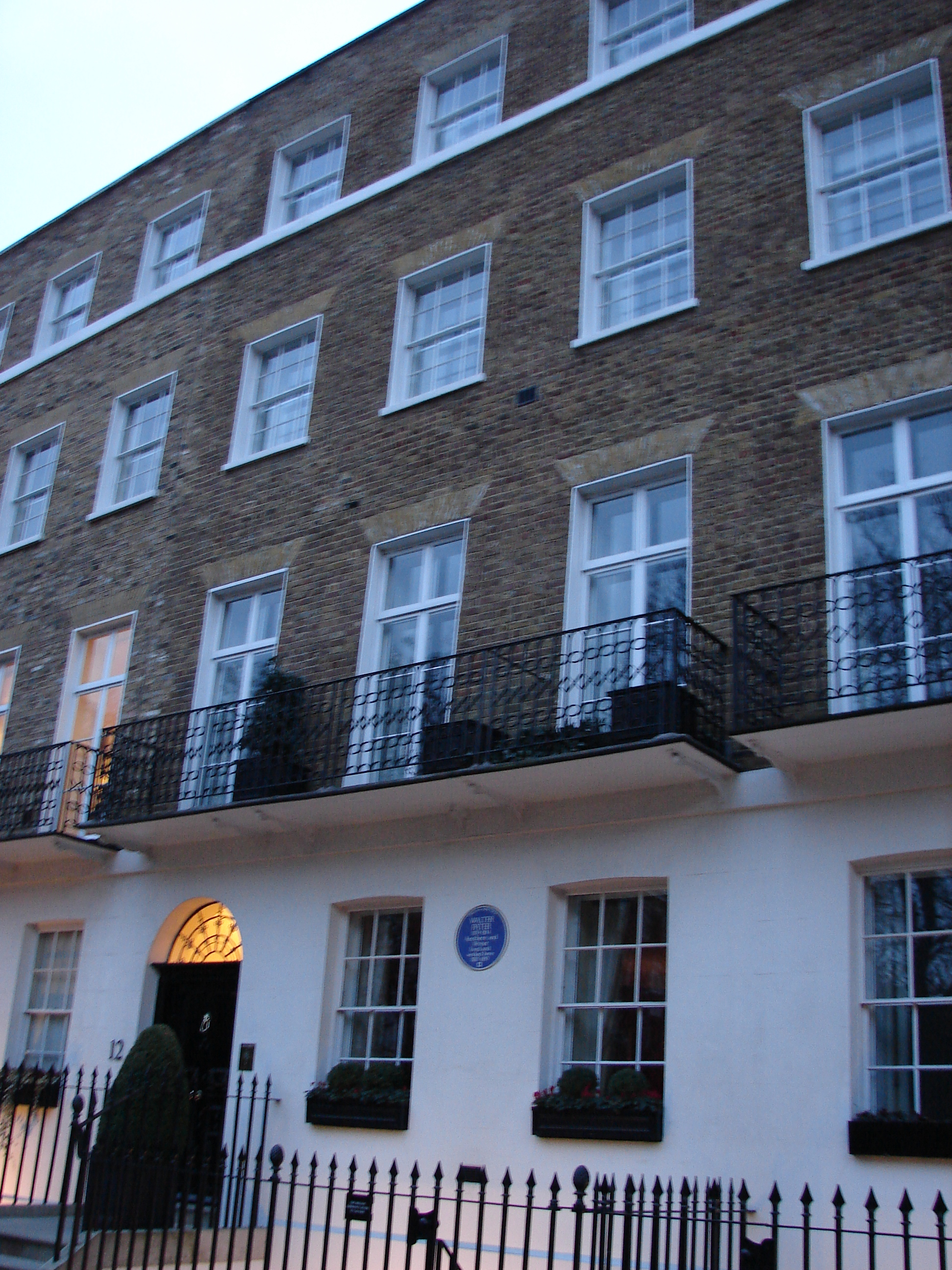 Walter Pater